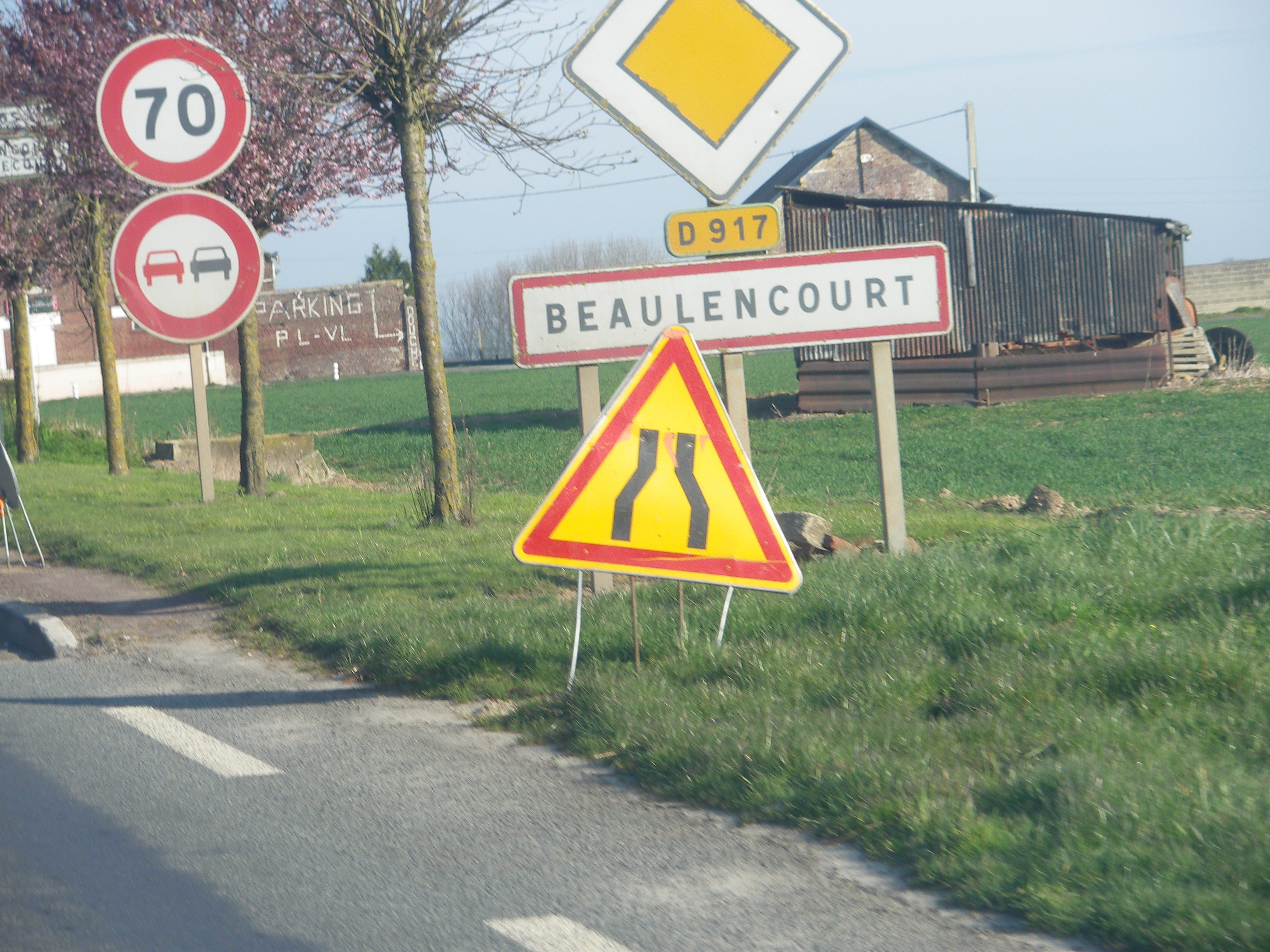 Vue d'une entrée de la commune de Beaulencourt.